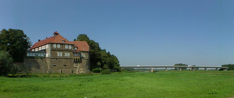 Schloß Petershagen an der Weser mit Weserbrücke im Hintergrund